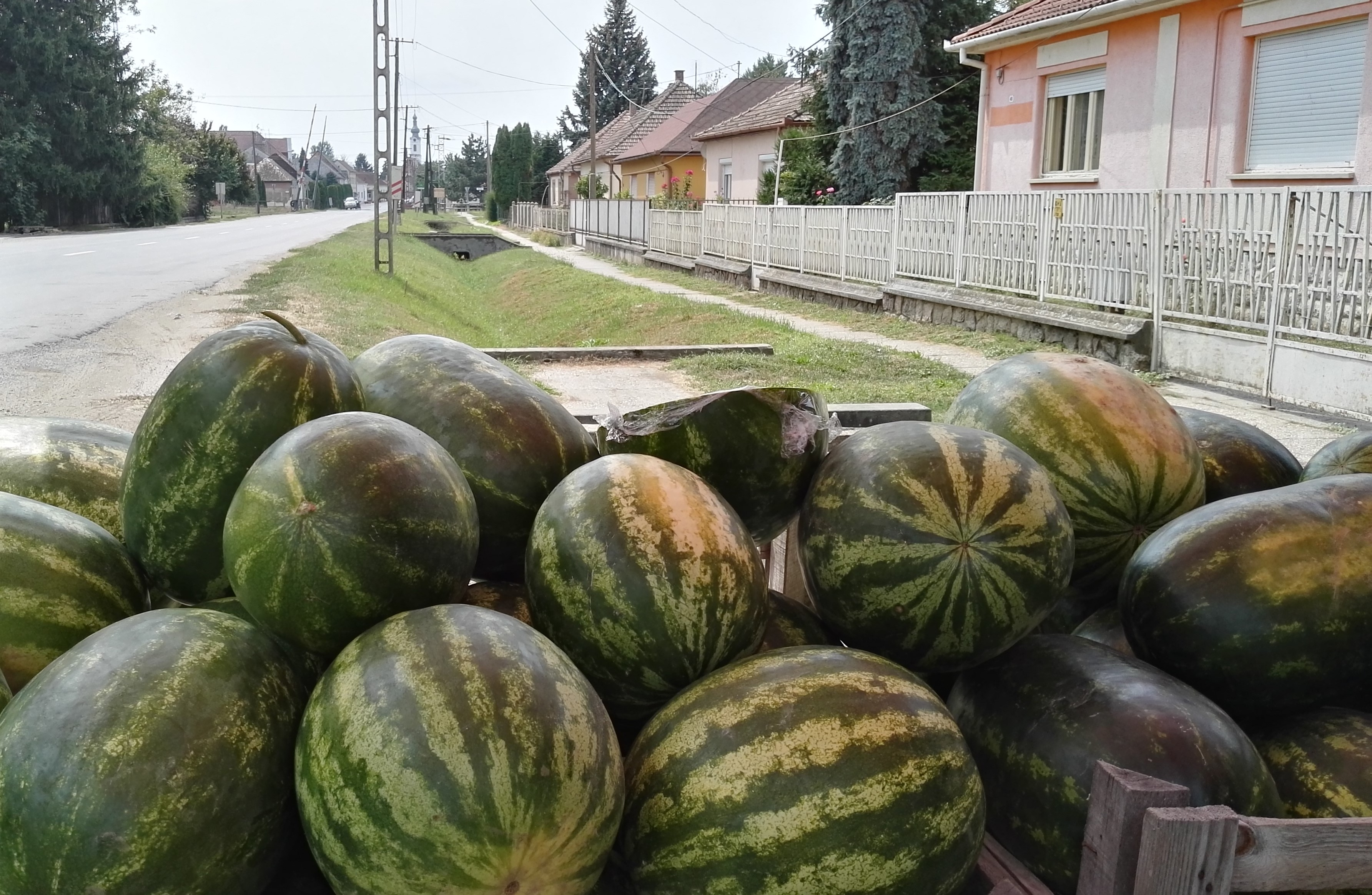 Híres vajszlói dinnye - Vajszló, Széchenyi utca